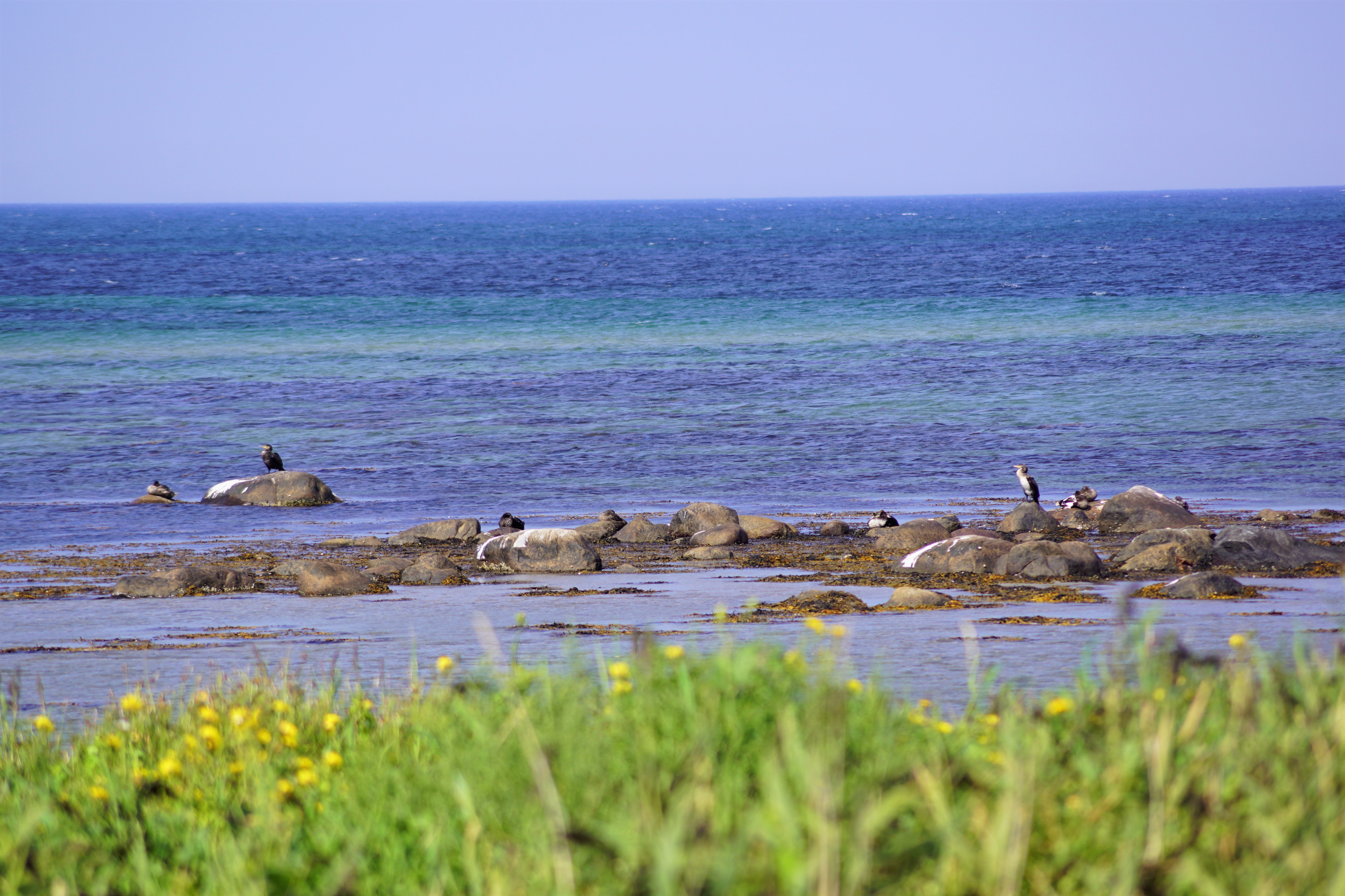 Ved Horneks Odde